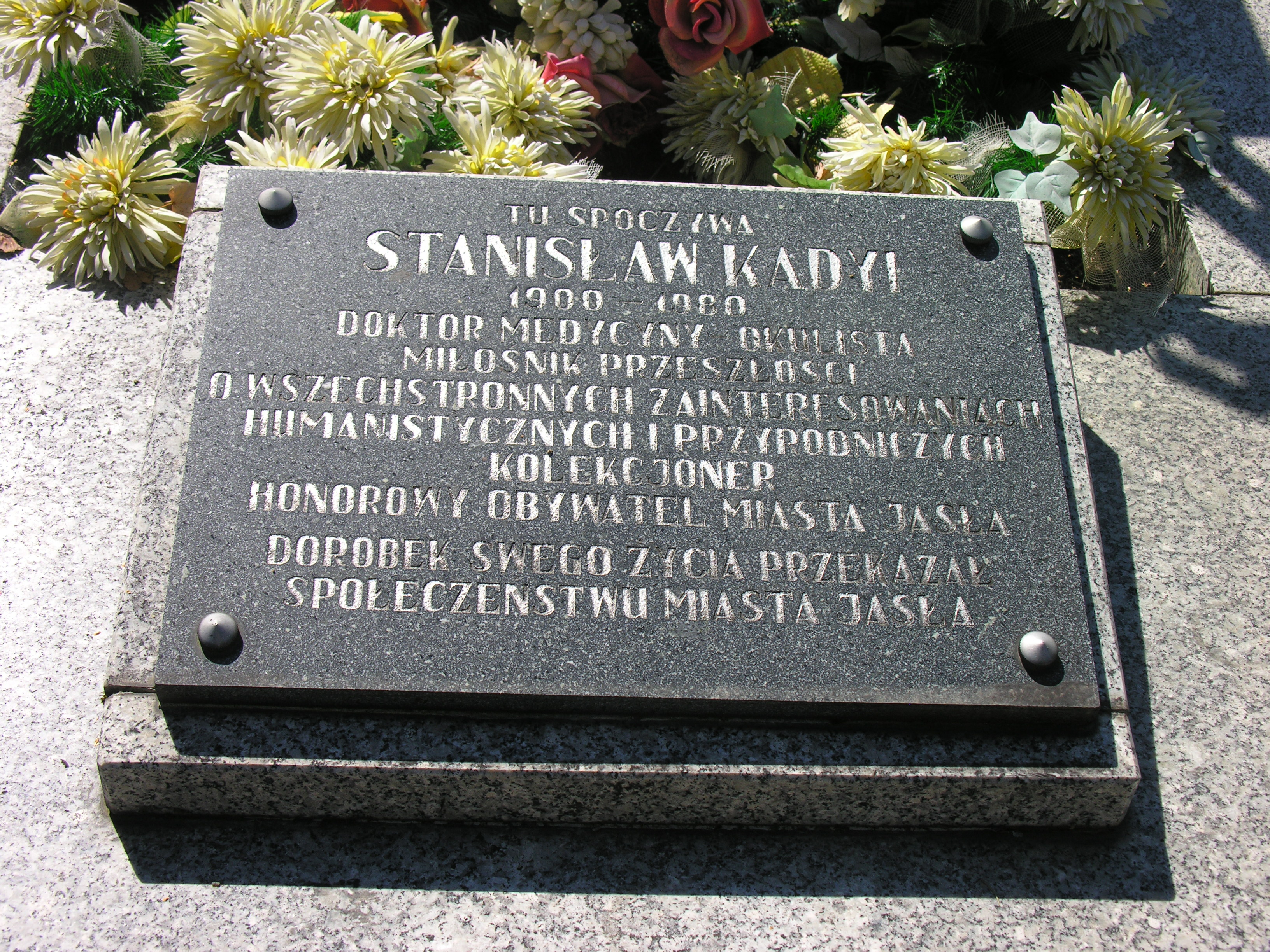 Grób Stanisława Kadyi na cmentarzu w Jaśle